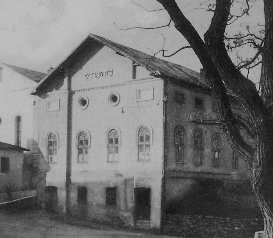 Wielka Synagoga w Sanoku w latach 30. XX wieku (autor fotografii )